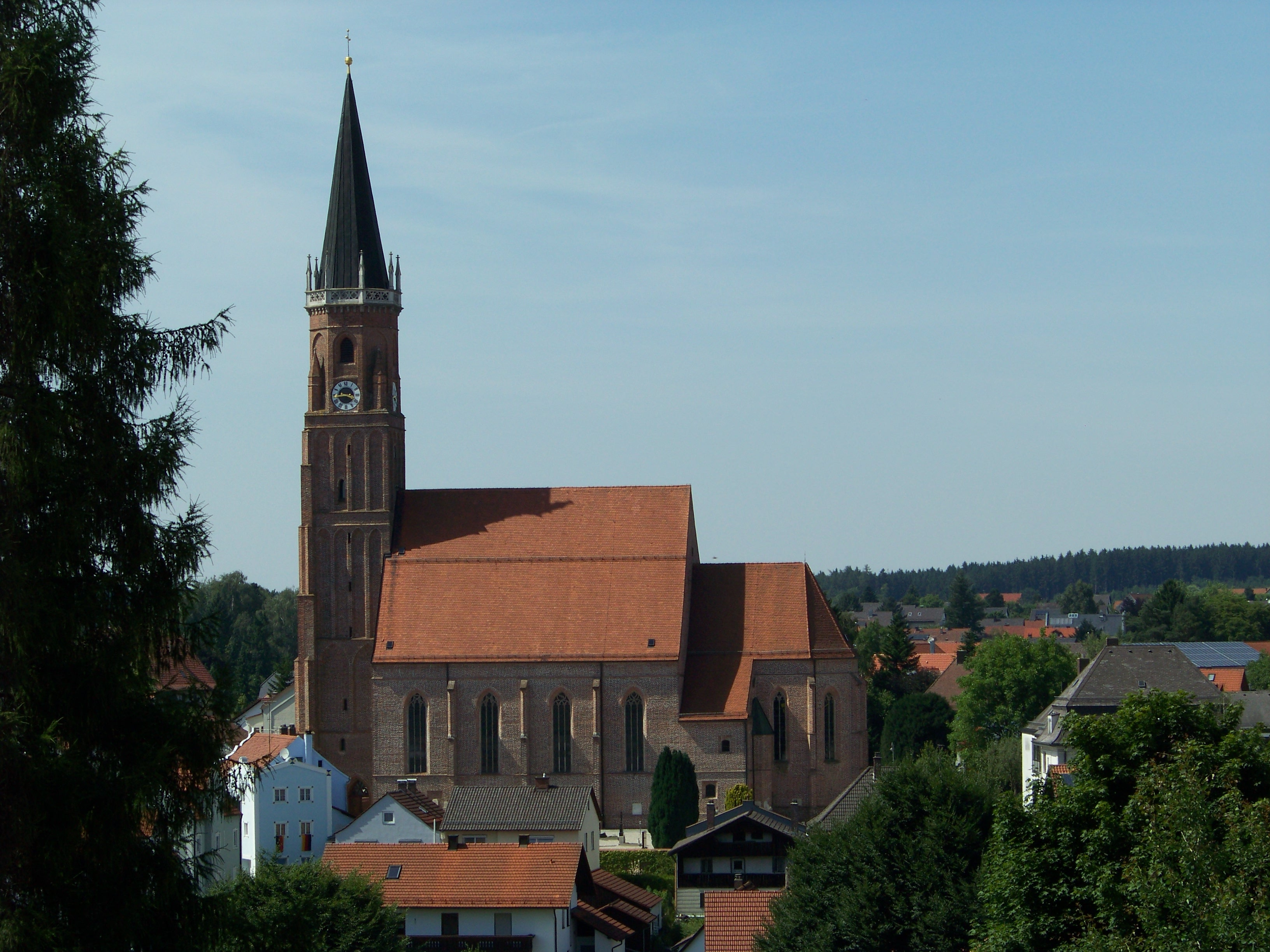 Geisenhausen, Martin-Zeiler-Straße 2. Katholische Pfarrkirche St. Martin. Spätgotische Hallenkirche der Landshuter Bauhütte, 1477, Turmobergeschosse nach 1547; mit Ausstattung; Friedhof mit neugotischer Ummauerung; Grabdenkmäler des 18. und 19. Jahrhunderts